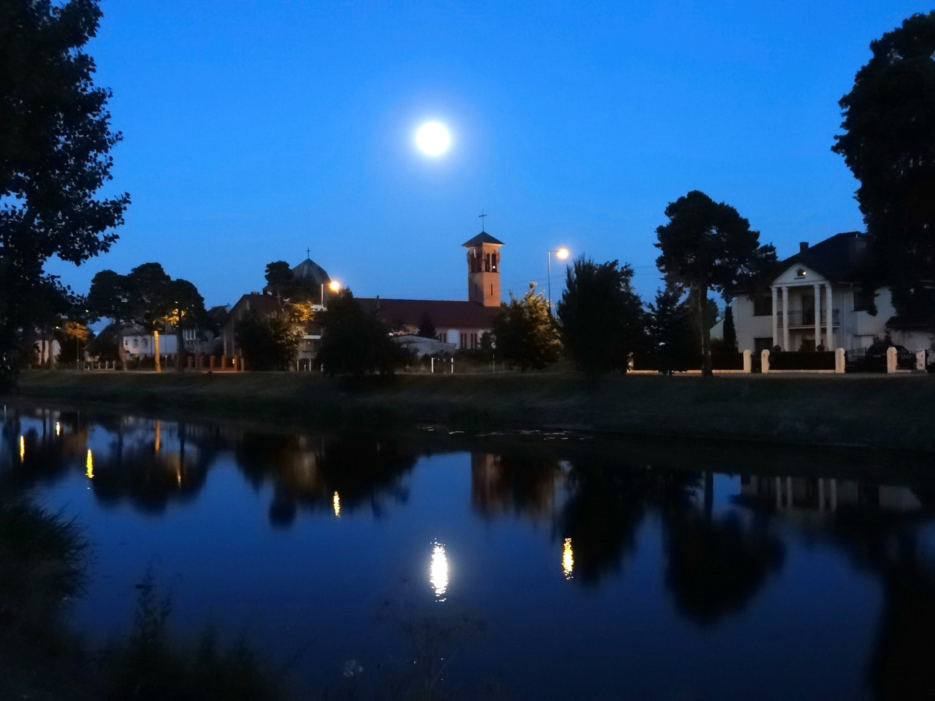 Kościół katolicki p.w. Matki Bożej z Góry Karmel w Bydgoszczy przy ul. Spacerowej nad Kanałem Bydgoskim